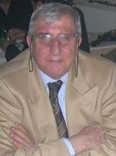 Fethi Heper.